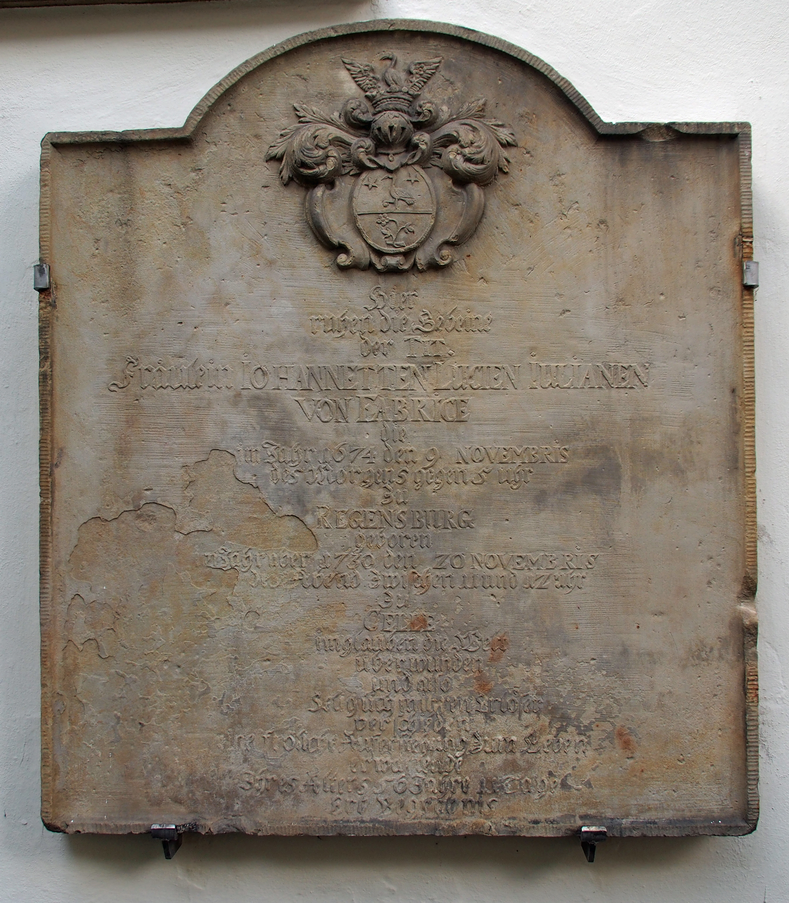 An der Stadtkirche St. Marien in Celle: Grabplatte des Fräulein Johannetten Lucien Julianen von Fabrice (* 9. November 1674 in Regensburg; † 20. November 1730 in Celle), Tochter des Diplomat und Staatsmann in den Diensten von Kurhannover Weipert Ludwig von Fabrice.